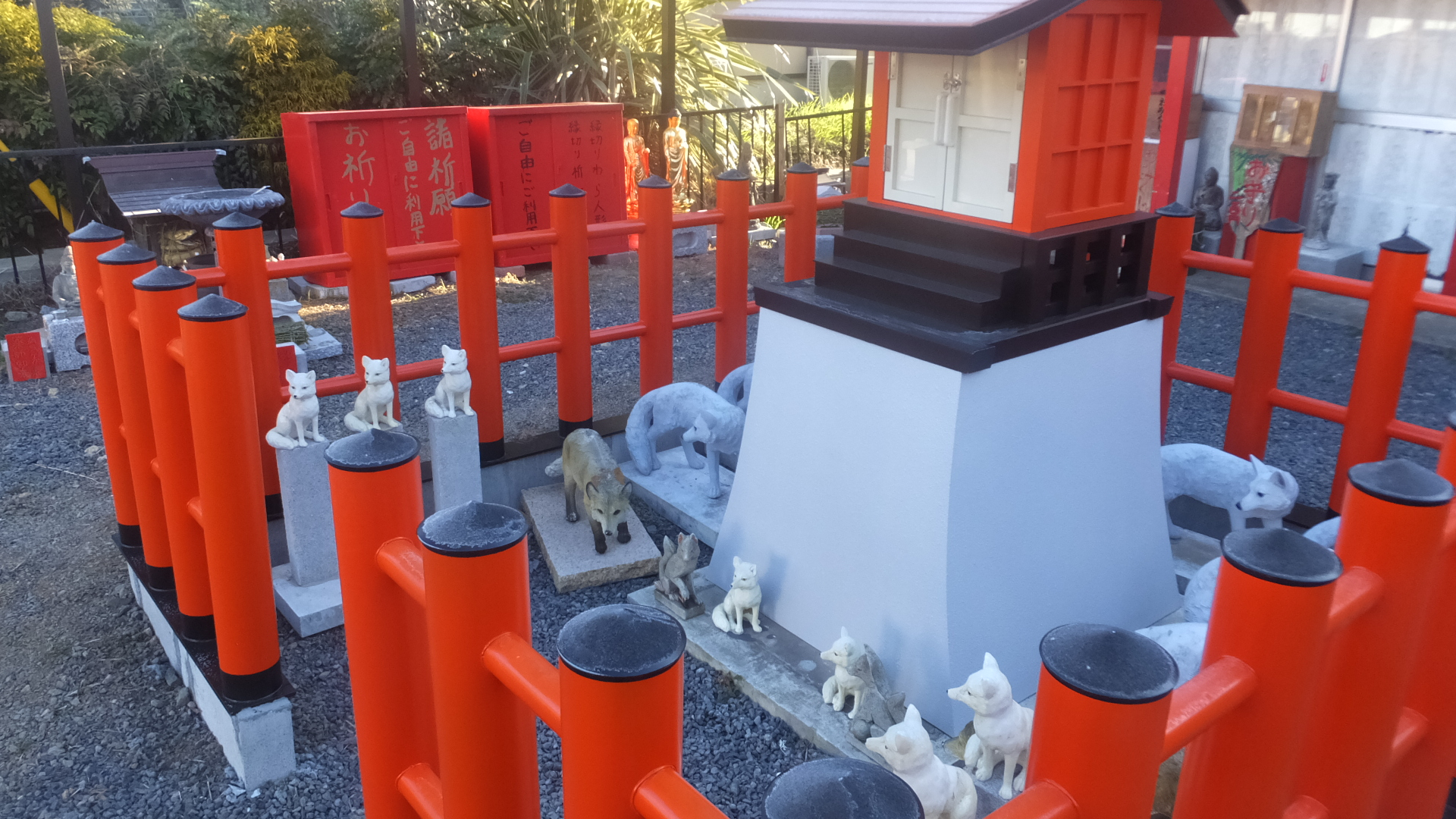 2019年1月6日に茨城県牛久市にある牛久成田山真浄寺で撮った写真です。大きな鳥居の奥には、稲荷狐と荼枳尼天が祀られています。